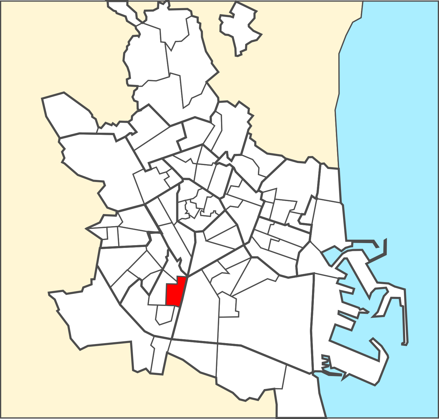 Localització del barri dins de la ciutat de València.